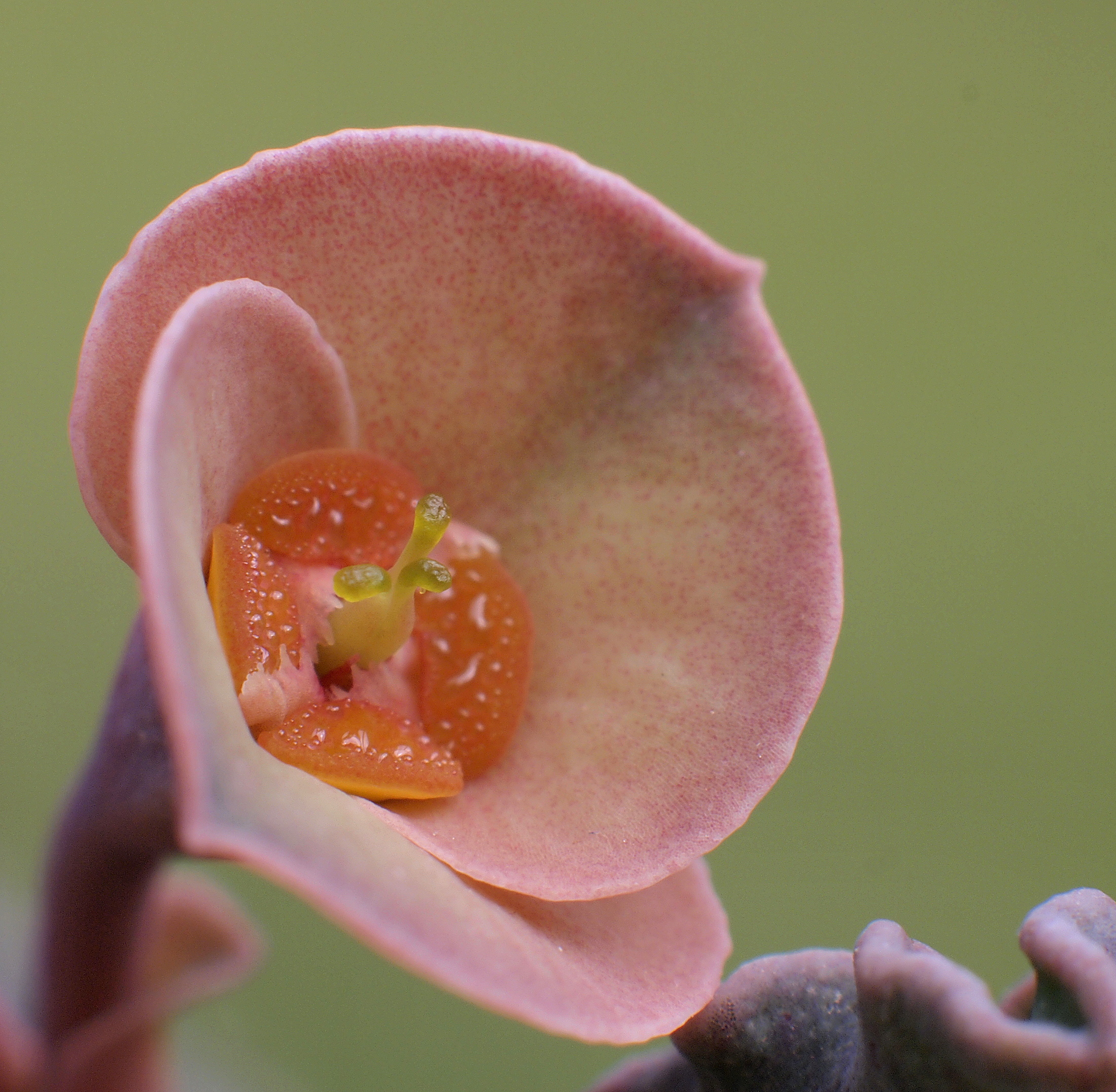 Euphorbia Cap Saint-mariensis